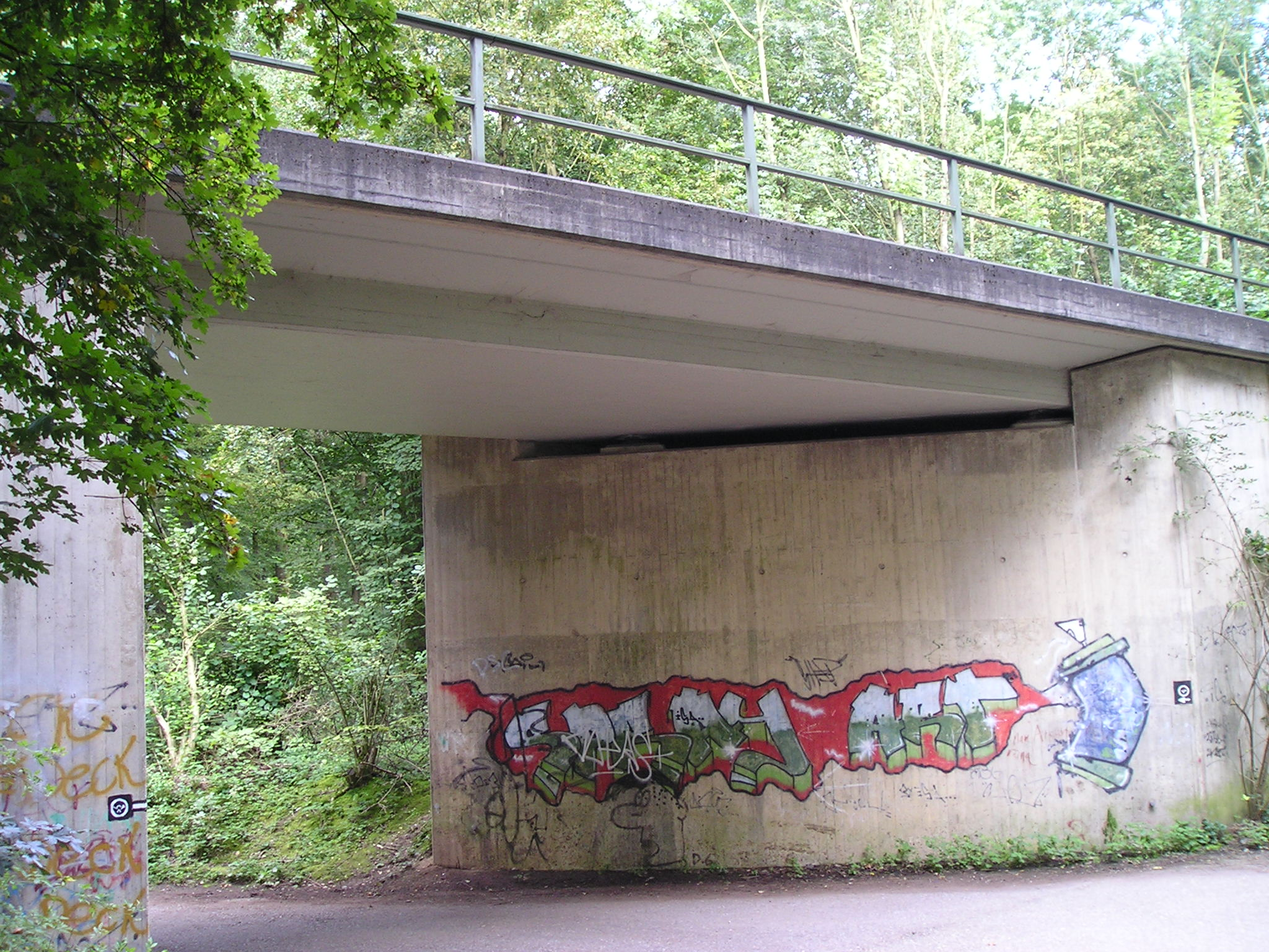 railway bridge of the Monheimer Bahn